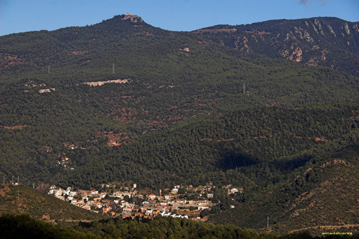 El Figaró vist des de "els Tremolencs", amb el Tagamanent al fons. Village of El Figaró (Vallès Oriental, Catalonia) with Tagamanent mountain behind.